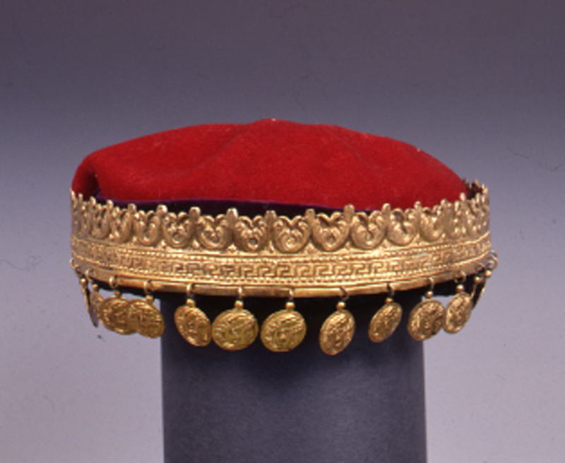 Διάδημα της ενδυμασίας κυρίας επί των τιμών, που καθιέρωσε η βασίλισσα Όλγα Αθήνα. Μέσα 19ου αιώνα 1985.21.3 / Συλλογή Πελοποννησιακού Λαογραφικού Ιδρύματος